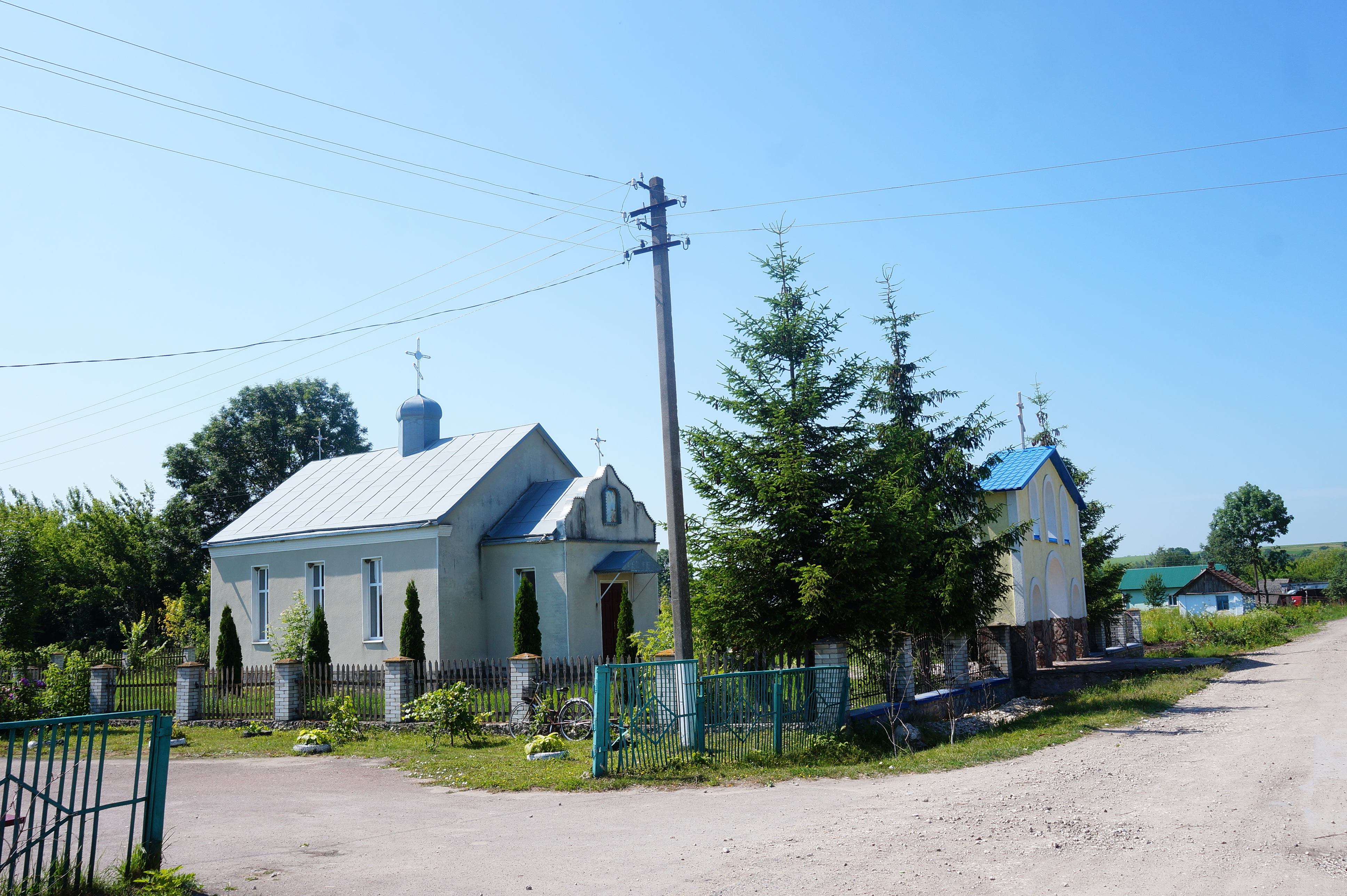 Церква у Мисловій